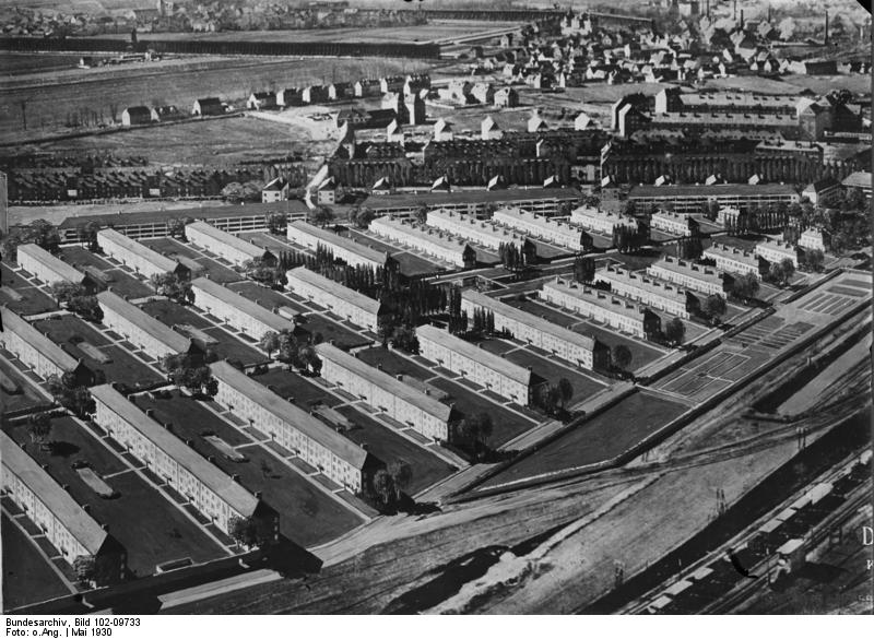 Eine neue deutsche Grossiedlung in Bad Dürrenberg bei Merseburg ! Blick auf die neue deutsche Grossiedlung in Bad Dürrenberg b/Merseburg aus der Vogelschau. Architekt der Siedlung ist der Berliner Baurat Alexander Klein.